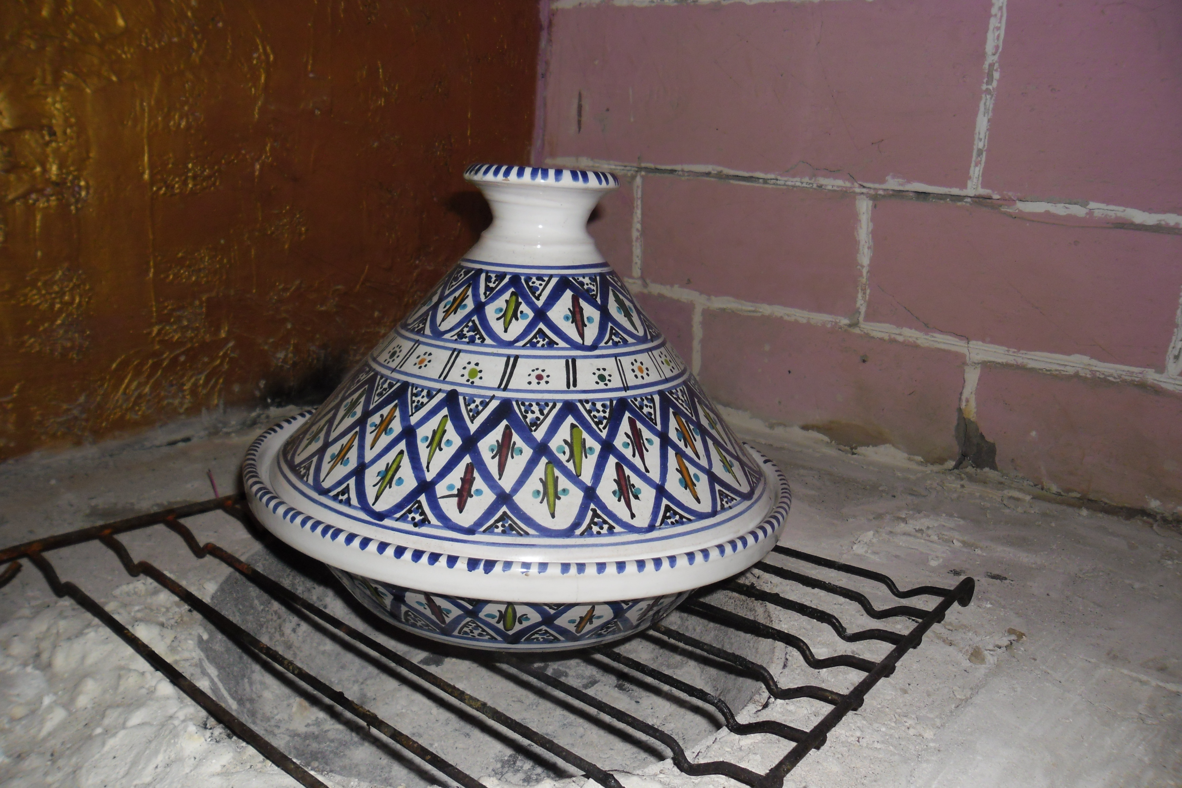 Фото таджина